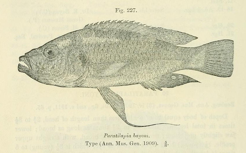 Haplochromis bayoni